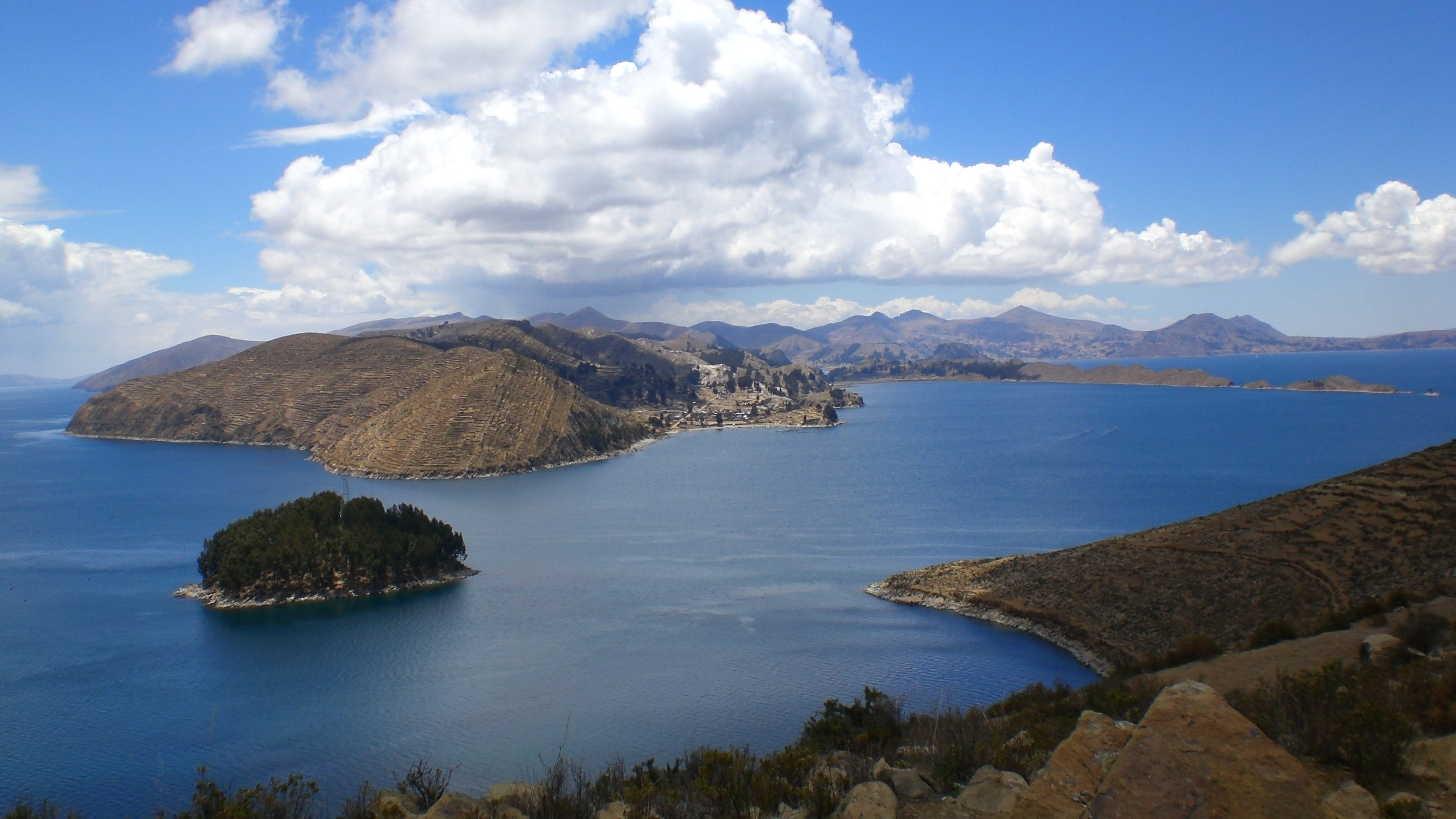 vista del estrecho de Yampupata que separa la isla del Sol con la península de Copacabana